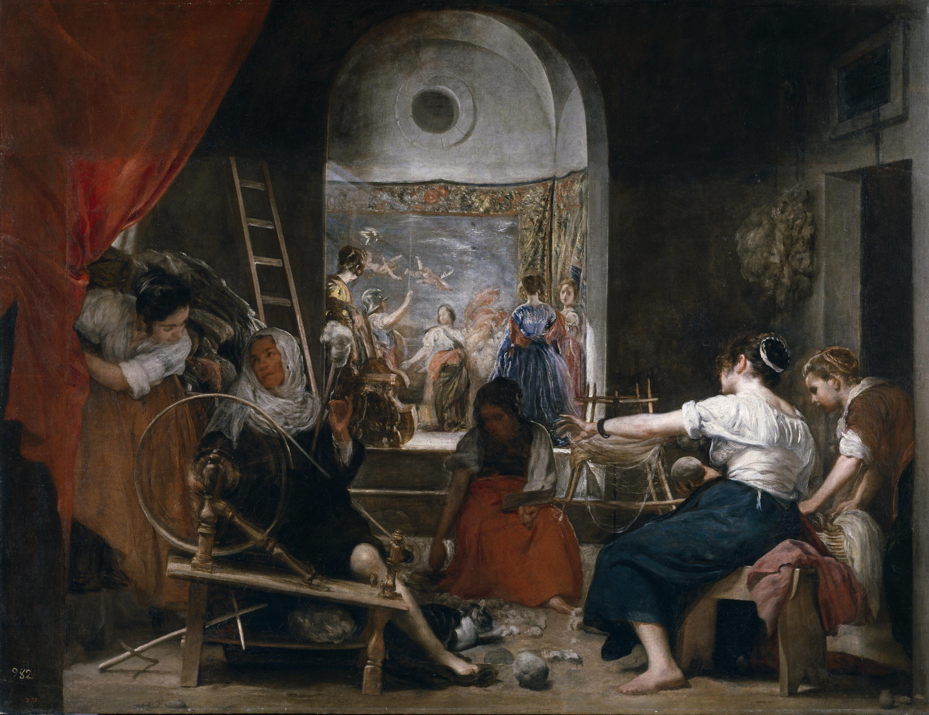 La obra representa el momento en que la tejedora Aracne fue convertida en araña por la diosa Atenea, y es una de las obras mitológicas más conocidas del pintor sevillano Diego Velázquez.